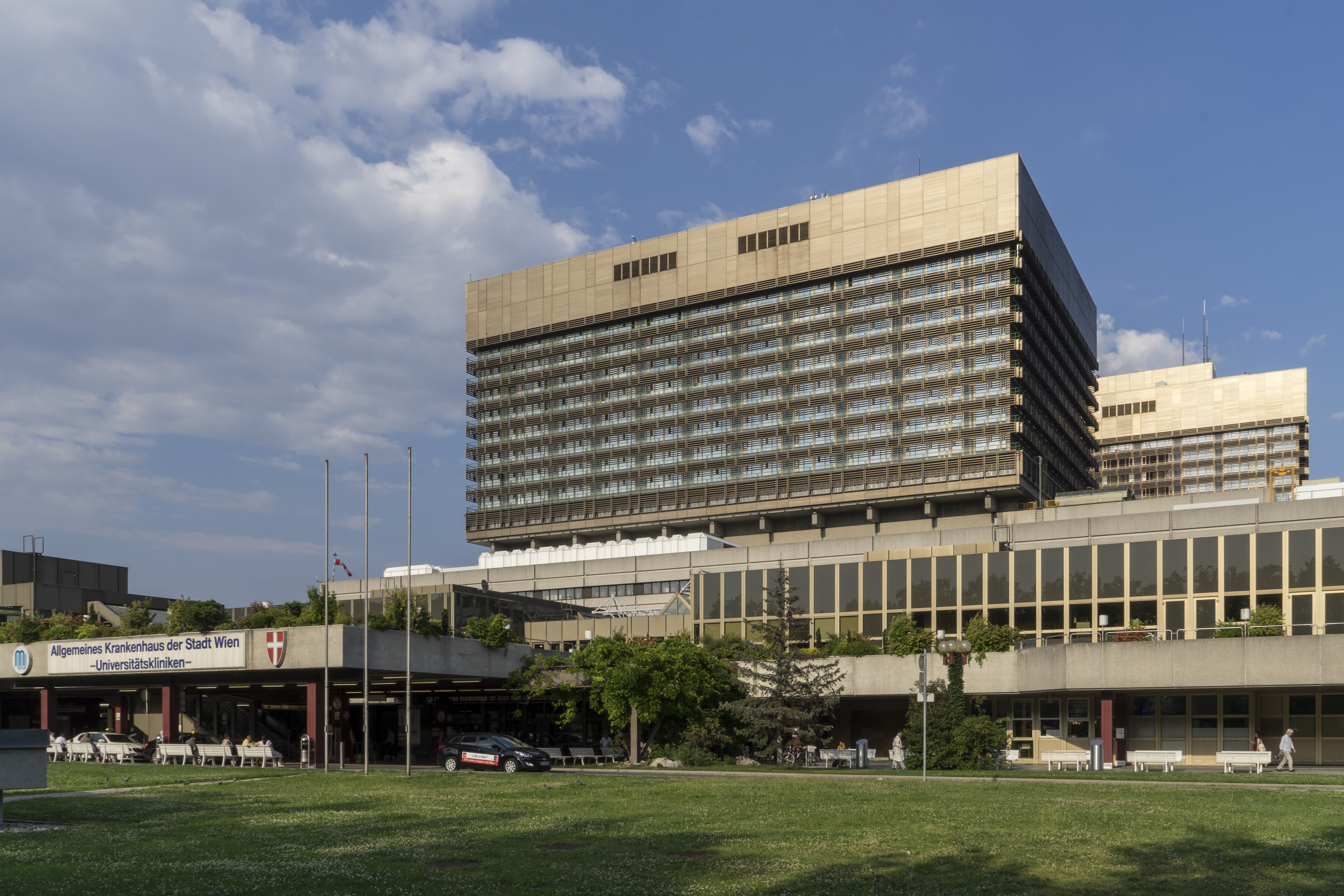 AKH Wien